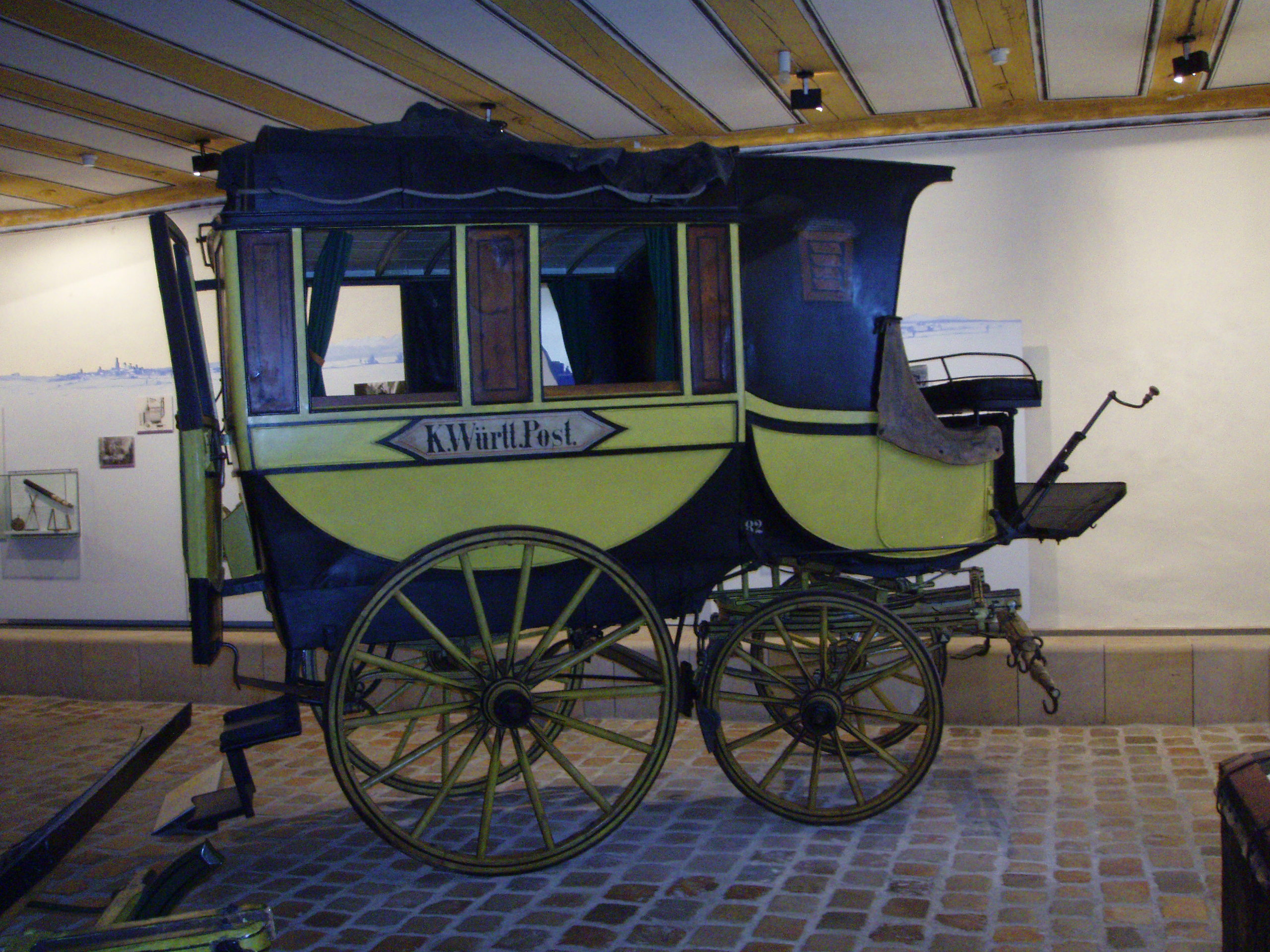 Omnibus der Württembergischen Post, gebaut 1889 in Stuttgart